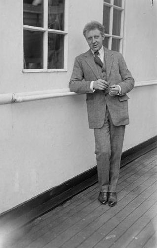 Leopold_Stokowski (1882-1977), conductor